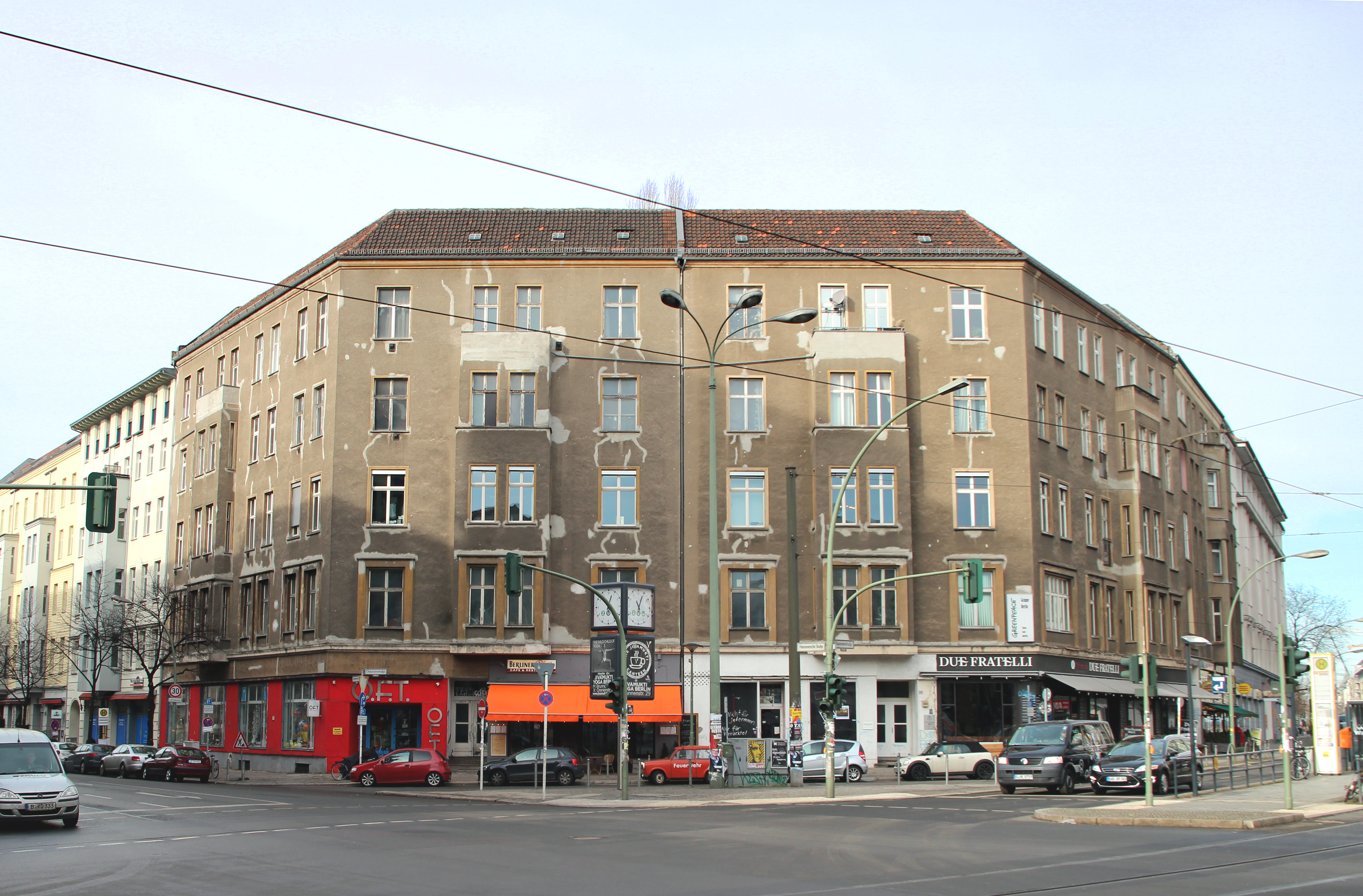 Bildinhalt: Berlin, Mitte, Gebäude Chausseestraße 131 Aufnahmeort: Berlin, Deutschland